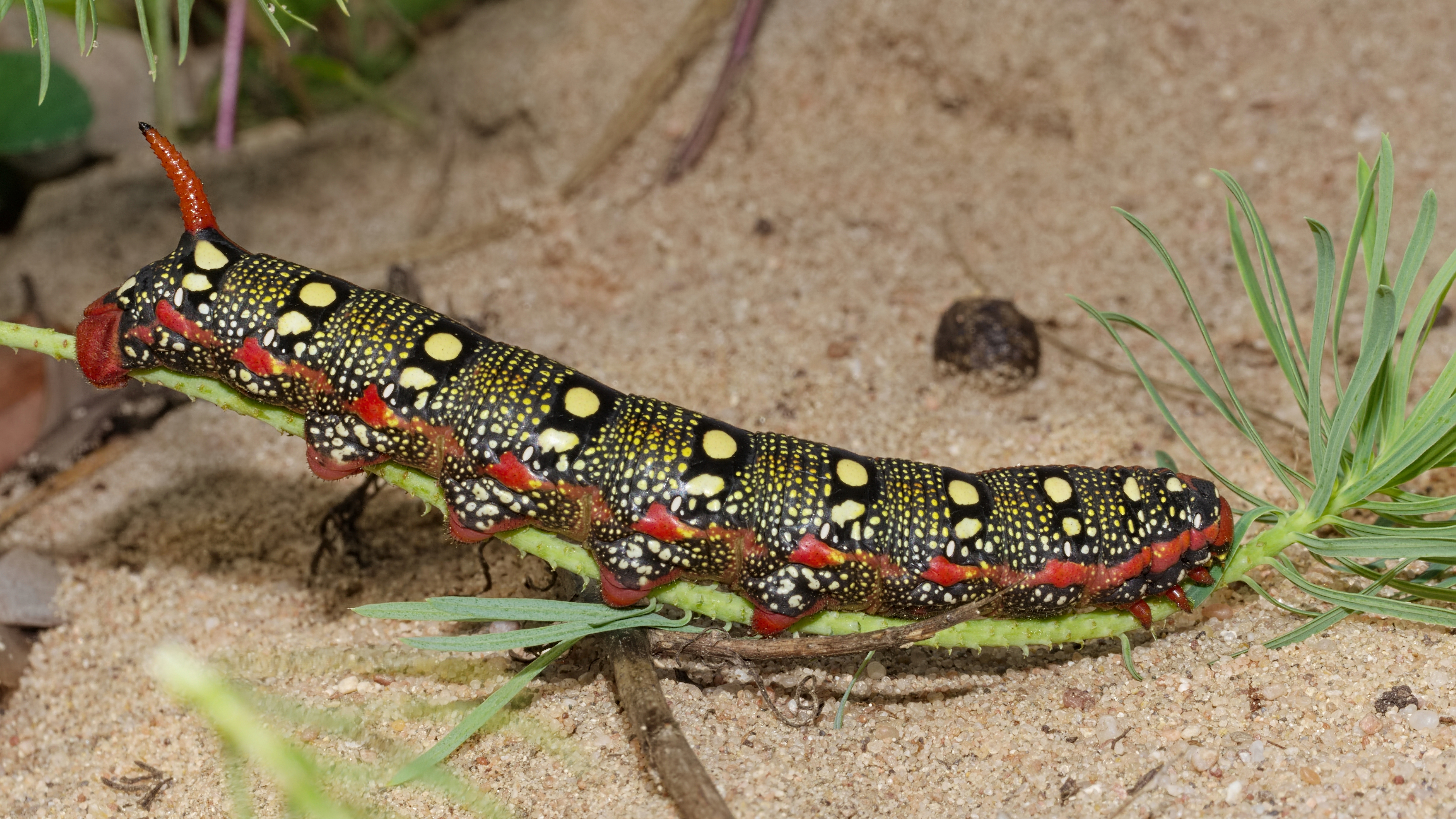 Wolfsmilchschwärmer - Hyles euphorbiae, Raupe. Aufgenommen in Mannheim im Käfertaler Wald, Baden-Württemberg, Deutschland.